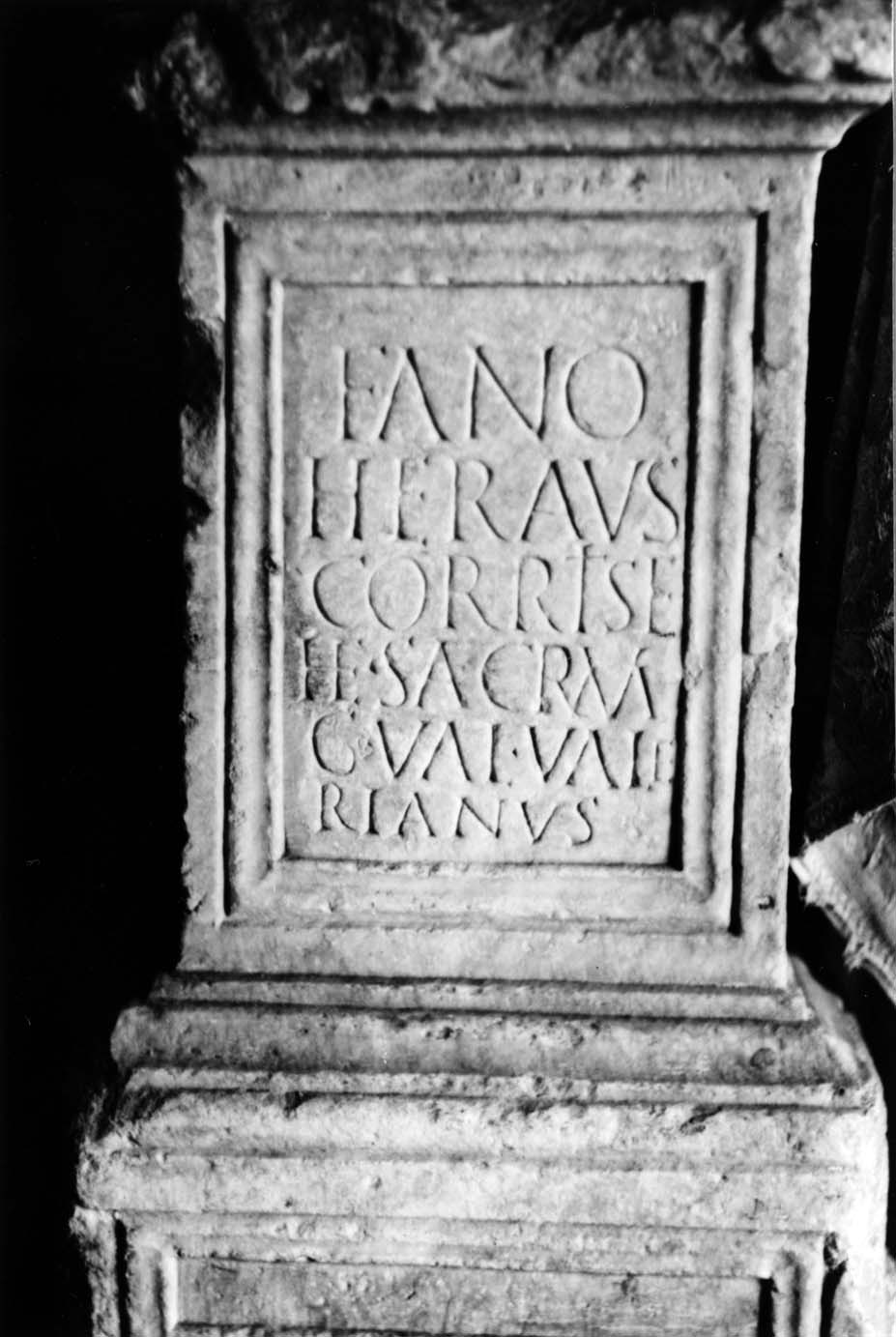 Atharratze-Sorholüze Aranheko Maria Madalenaren ermitan aurkitzen den Herauscorritseheri eskainiriko erromatar aldare-harria. 1986.